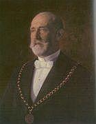 Matouš Talíř